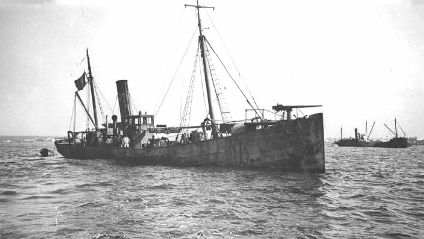 Le Rusé. L'un des nombreux chalutiers armés par la Marine française pour la lutte anti sous-marine pendant la Première Guerre mondiale.